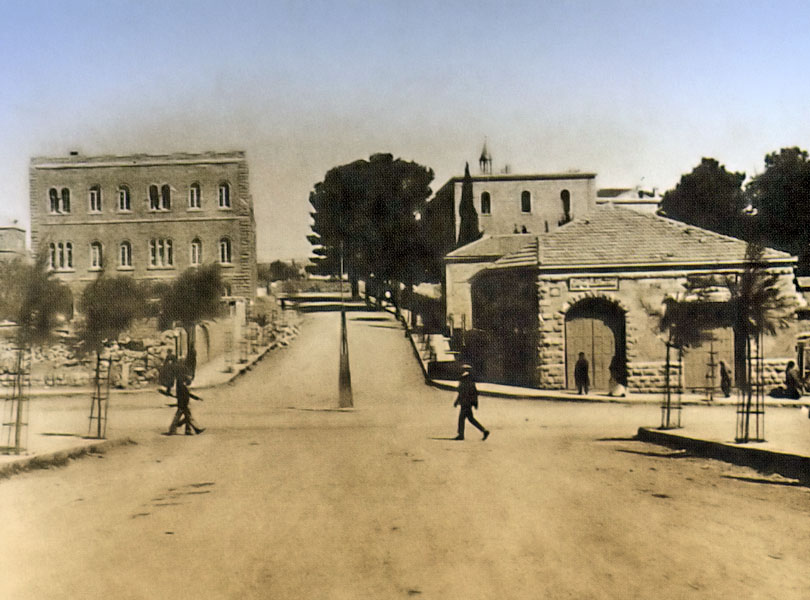 "צומת האיקסים" בשנת 1924, מבט צפונה